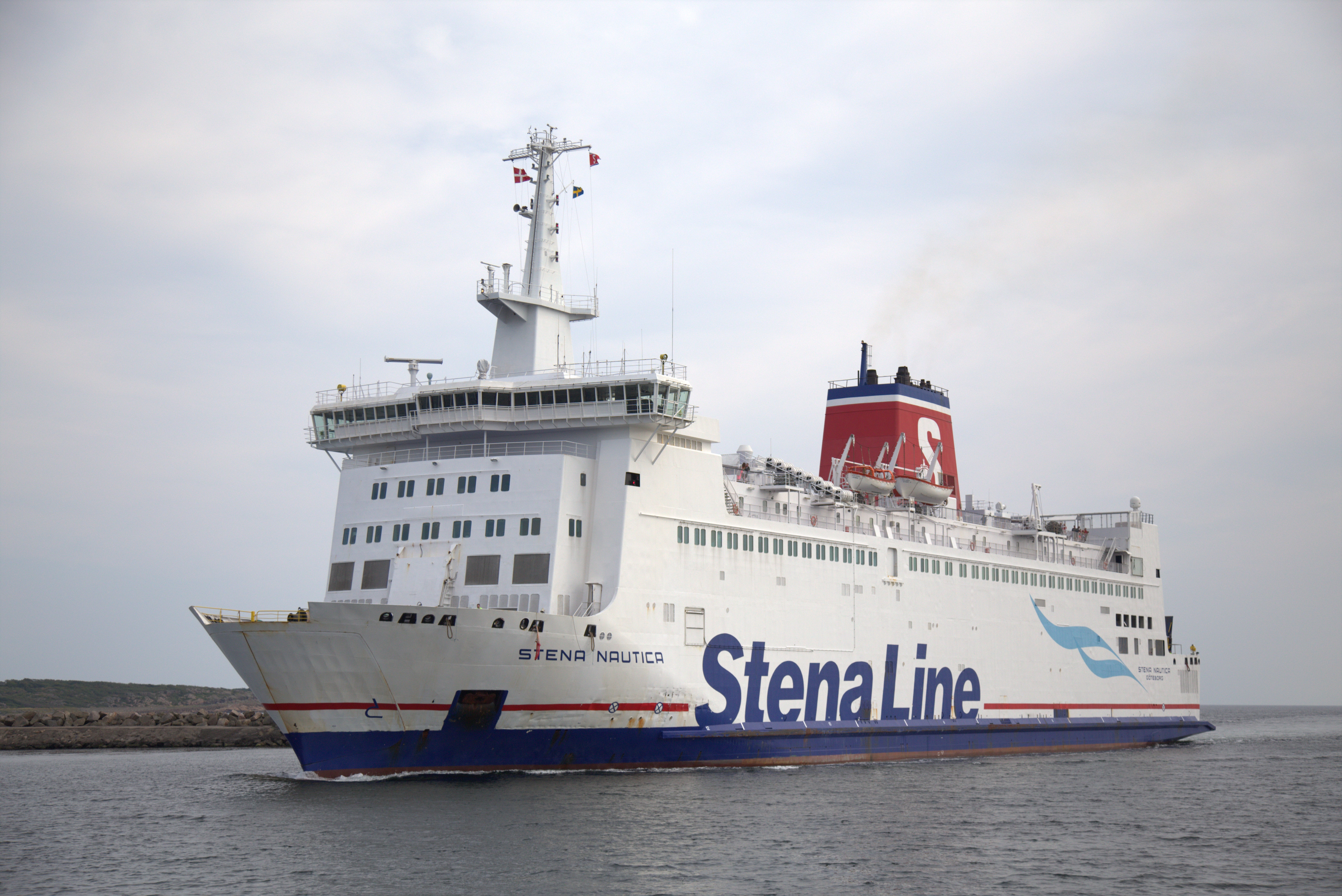 Stena Nautica på väg in i Varbergs hamn.